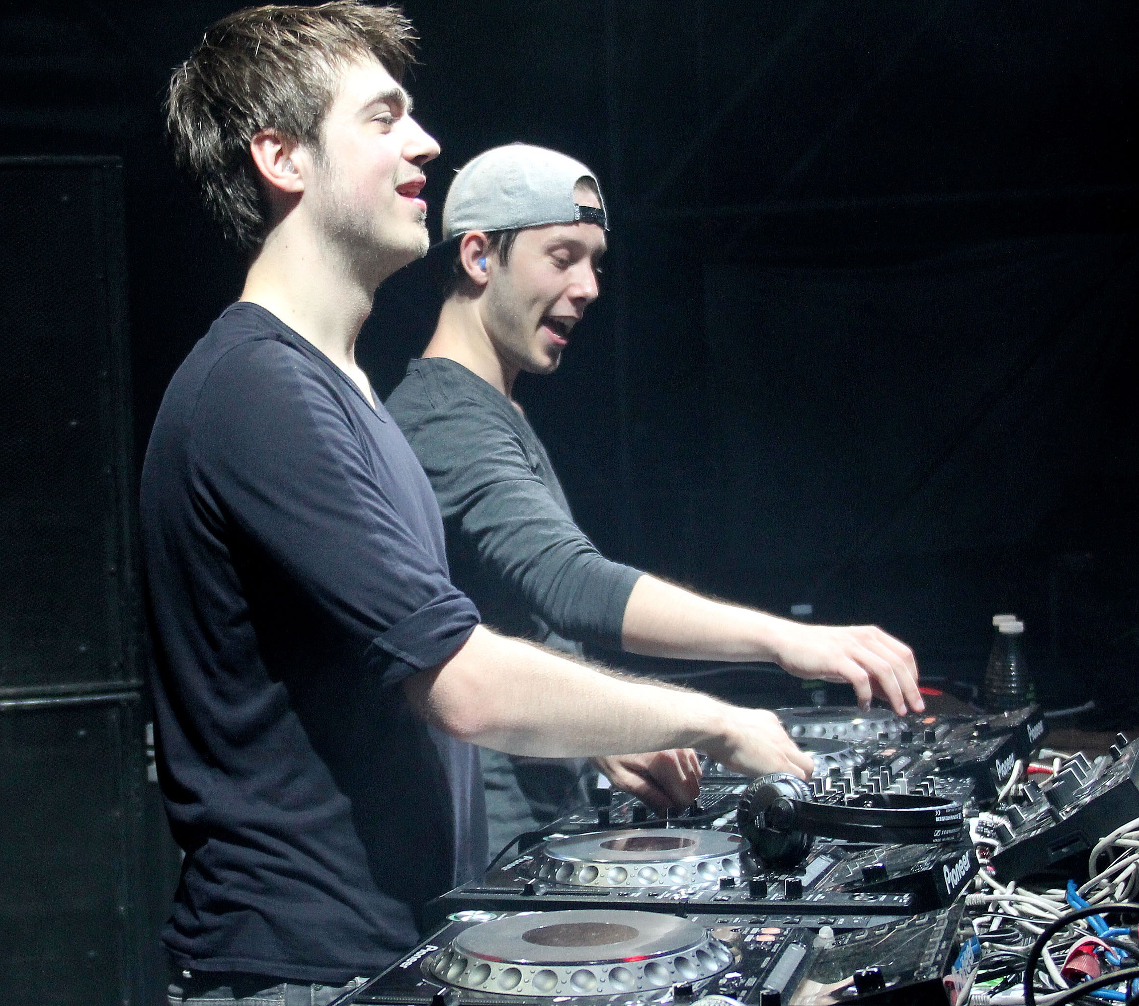 Vicetone el pasado 16 de Agosto en Nightfall Festival realizado en Alicante.